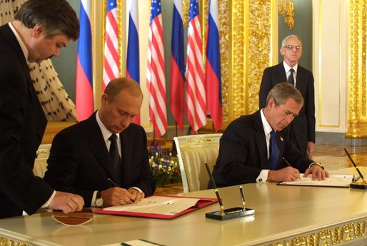 President of Russia Vladimir Putin and President of the United States George W. Bush sign the Strategic Offensive Reductions Treaty in Moscow on 24 May 2002. Taken from English Wikipedia. Президент России Владимир Путин и Президент США Джорж Буш подписывают договор о сокращении стратегических наступательных потенциалов.